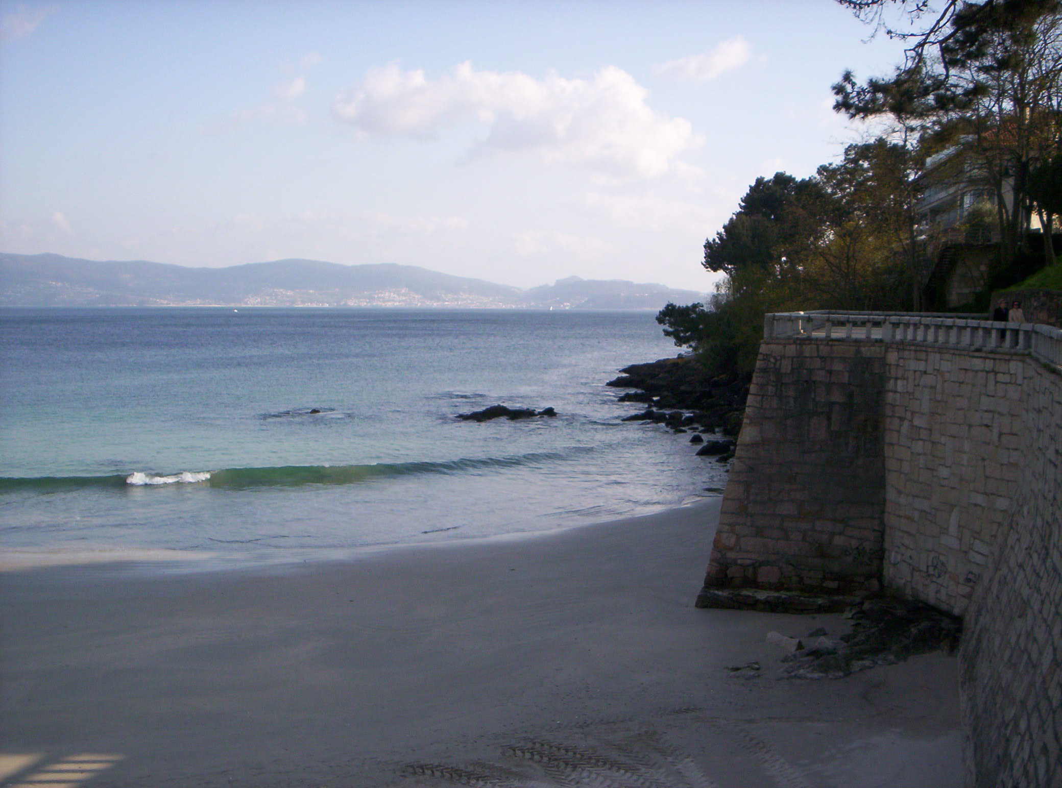 Praia de Sanxenxo, na Galiza, na Espanha. Beach at Sanxenxo, Spain.